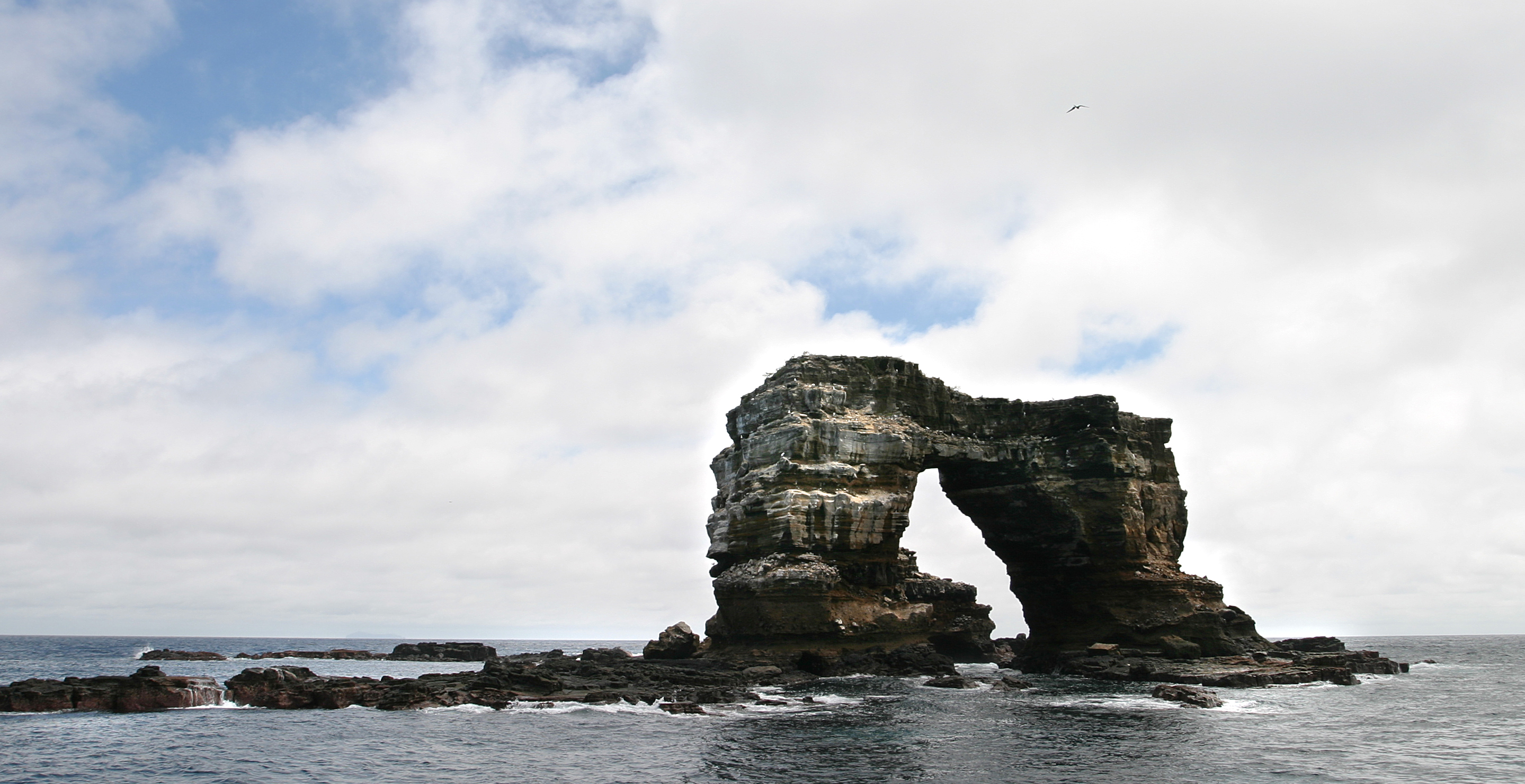 Darwin's Arch, Galapagos